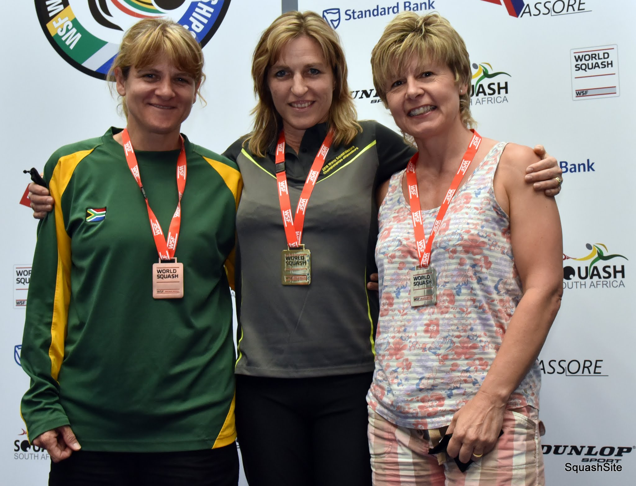 WO45 Linda Shannon, Sarah Fitz-Gerald, Andrea Santamaria aux England squash masters